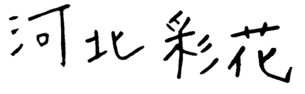 河北彩花ポスターサイン（ラムタラ東村山店）